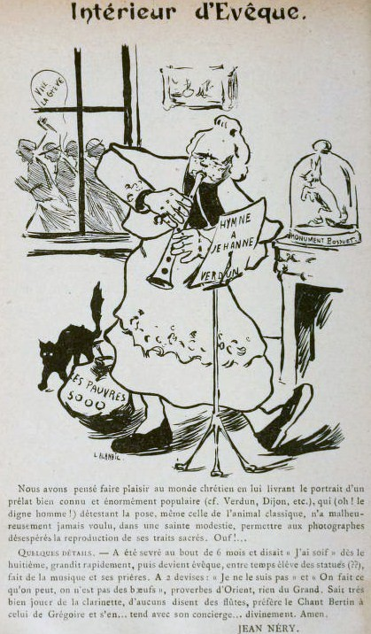 Photographie d'une reproduction (in Robert Piot, Les dessous de l'affaire Le Nordez, Paris, 1905) d'une planche (1903) de la Mère folle, traitant de l'affaire Le Nordez.